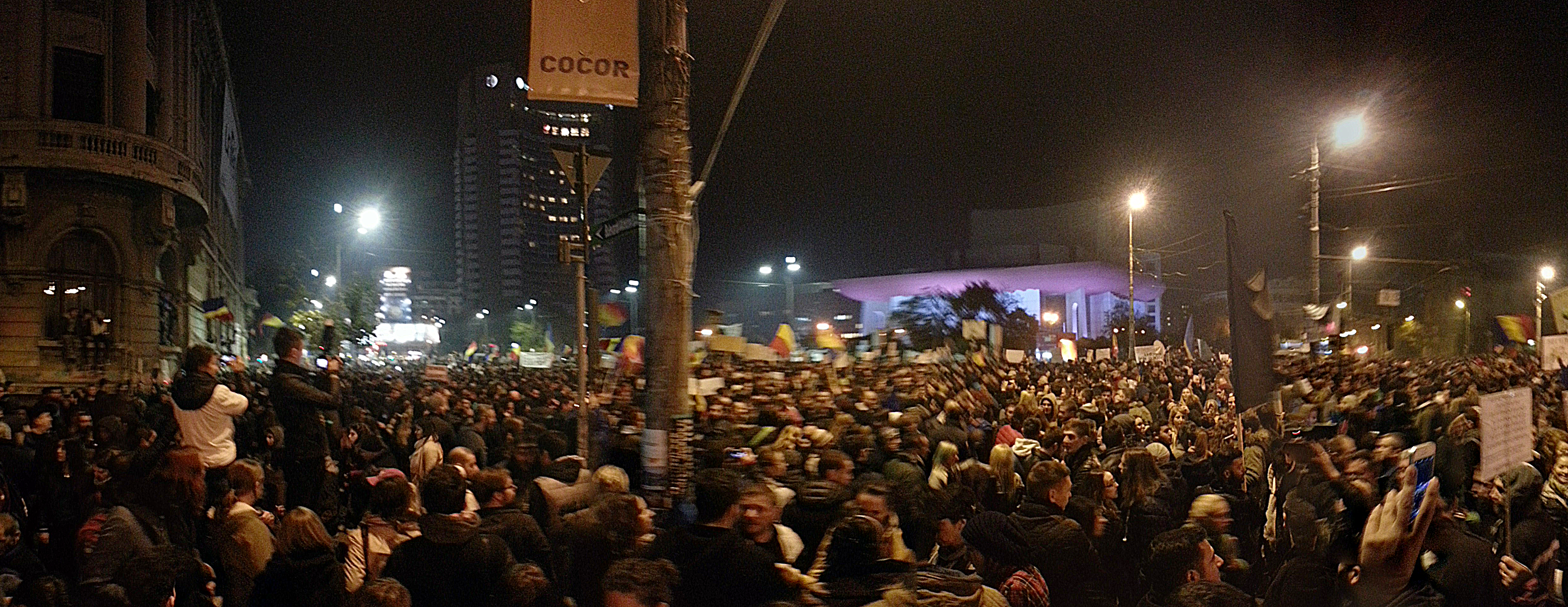 Panoramă fotografică a protestelor din Piața Universității din București în seara zilei de 5 noiembrie 2015. Versiune mai strânsă a imaginii Proteste Piața Universității București 5 noiembrie 2015.png